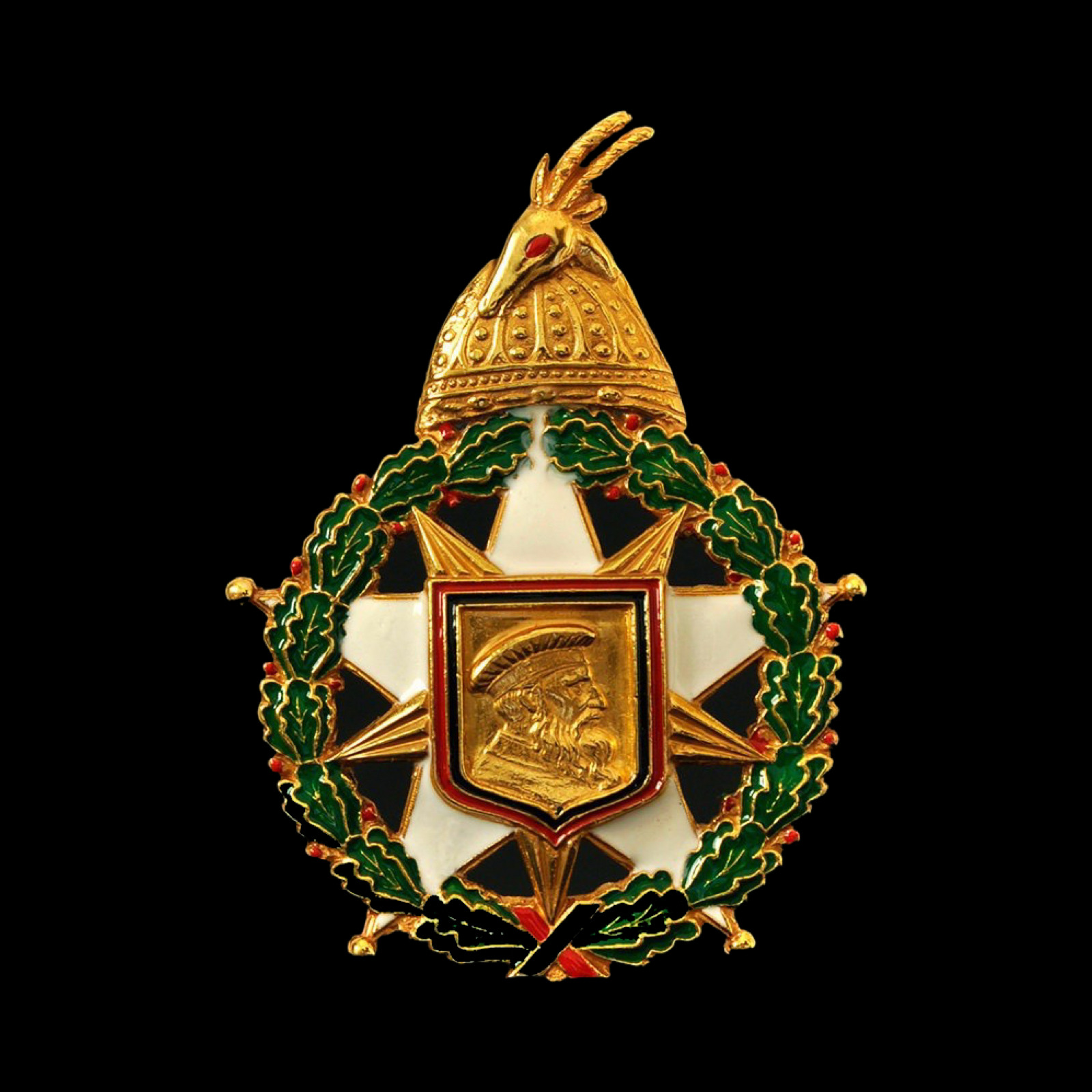 "Gjergj Kastrioti Skënderbeu" Decoration (1996—)